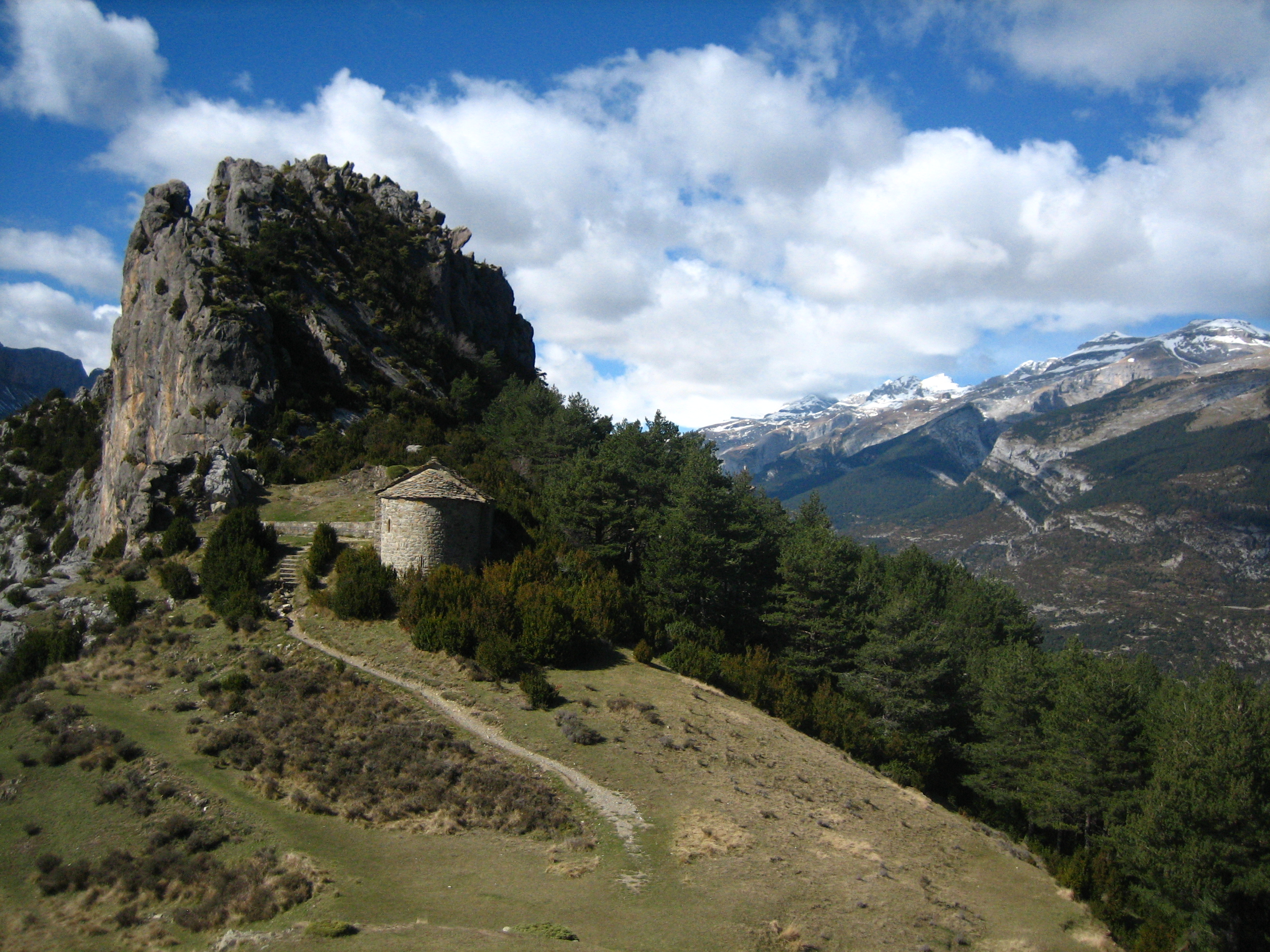 Ermita en Tella (Alto Cinca)